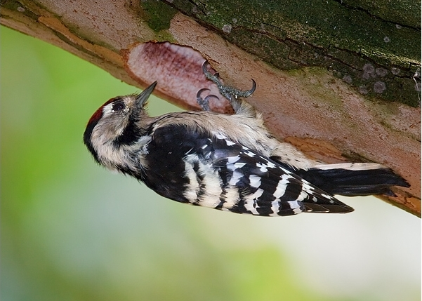 Dendrocopos minor, Kroměříž, CZ